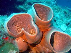 Foto de una esponja